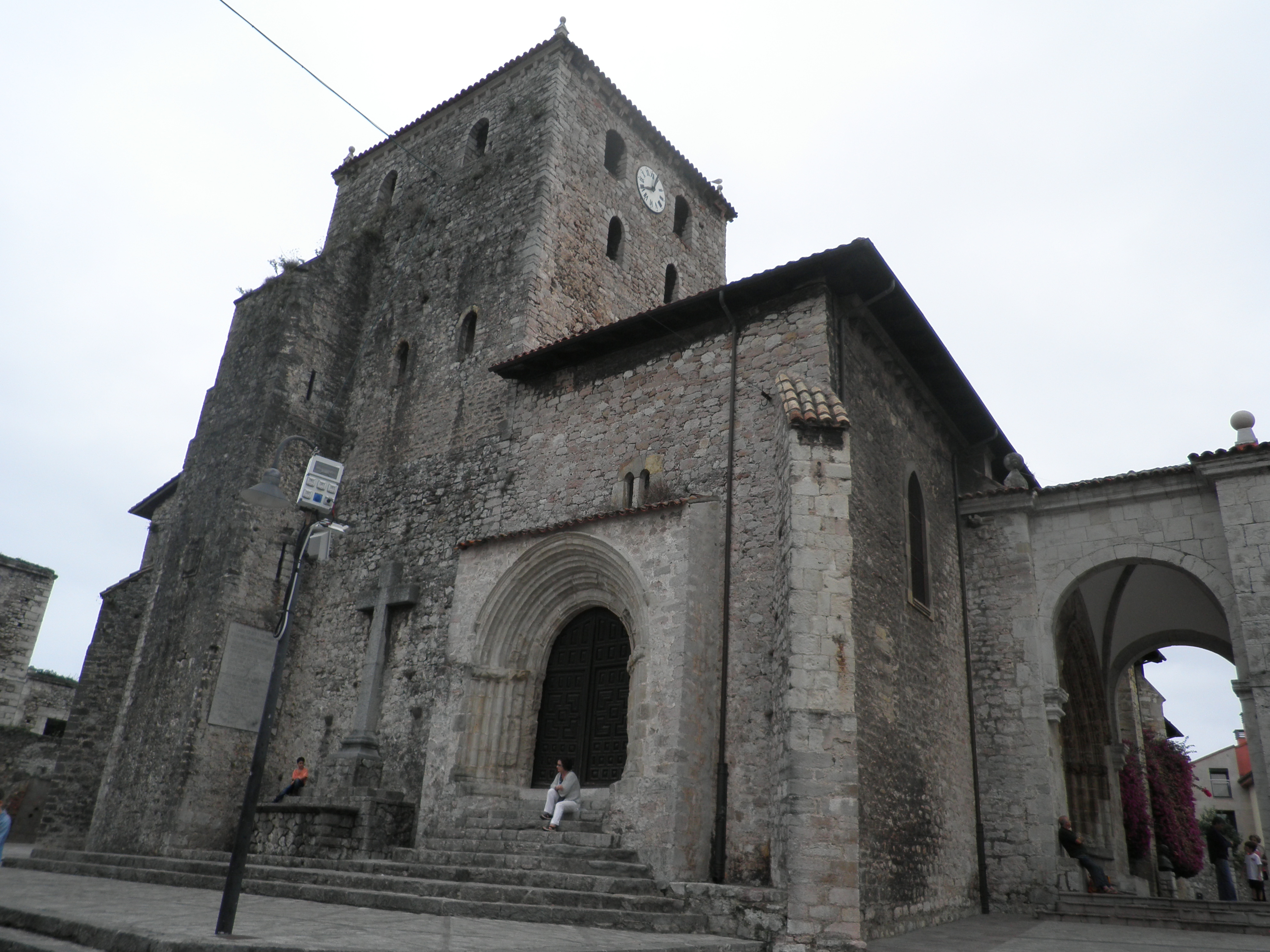 Esglèsia de Santa María del Conceyu a Llanes (Asturies)